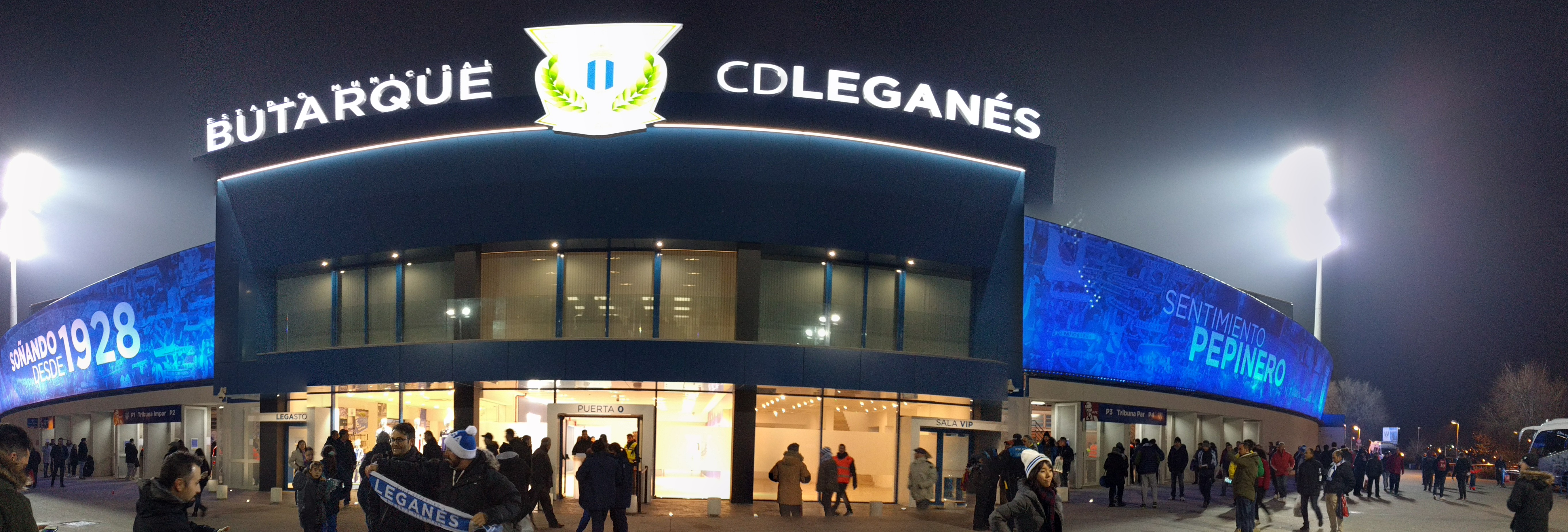 Fachada exerior de la tribuna de Butarque